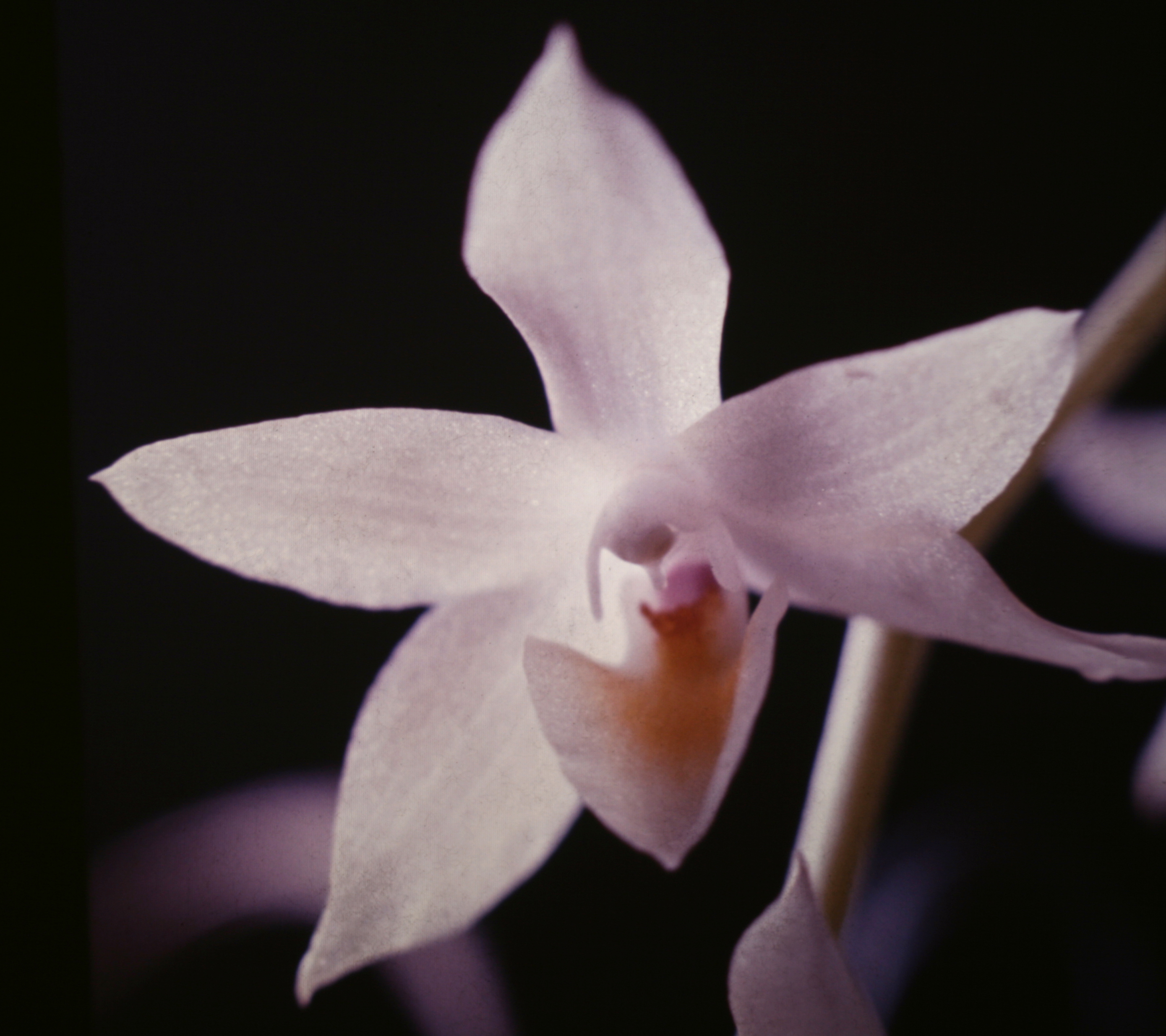 Aganisia pulchella, Suriname.